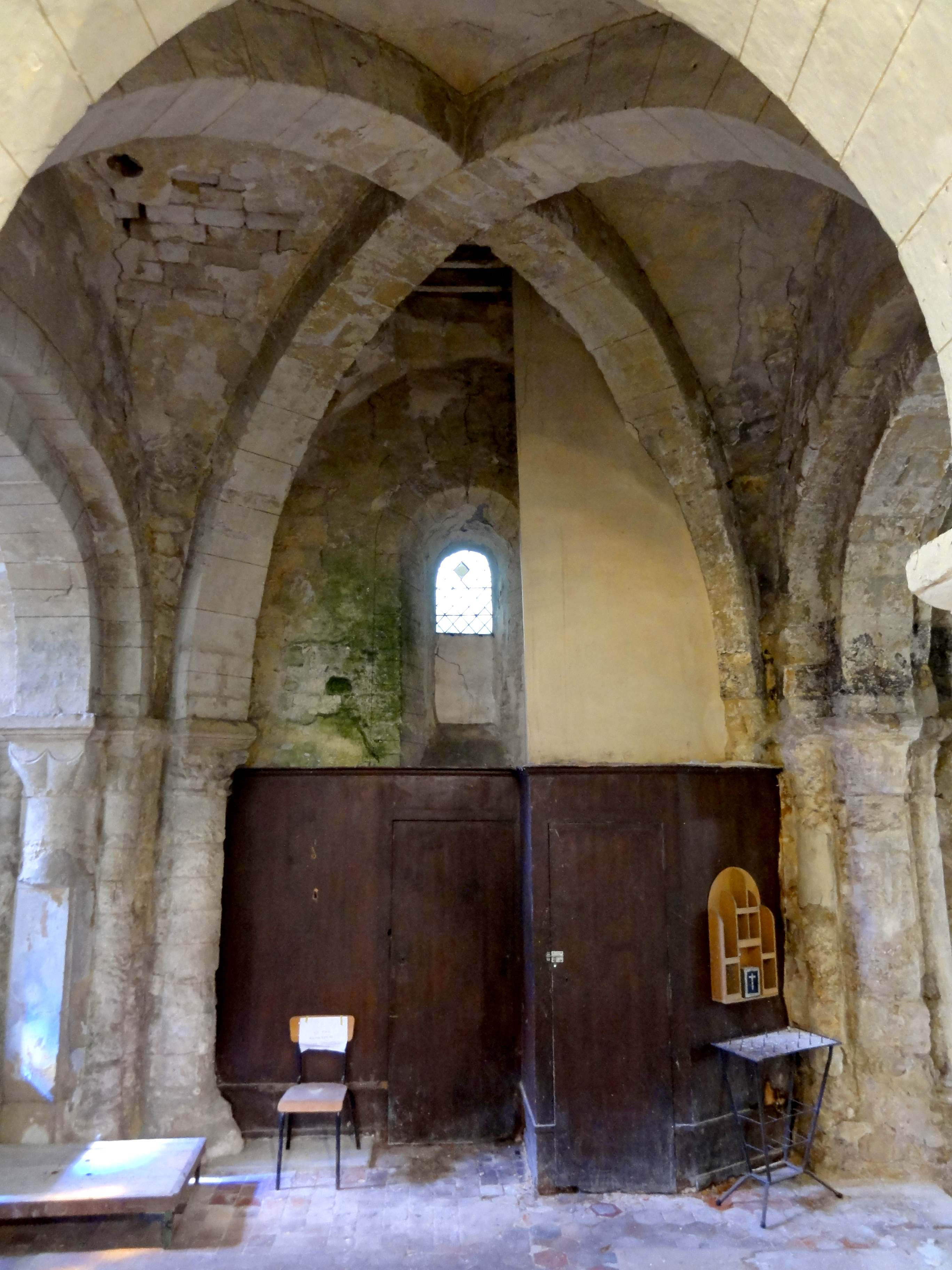 Intérieur de l'église Saint-Pierre-et-Saint-Paul (voir titre).